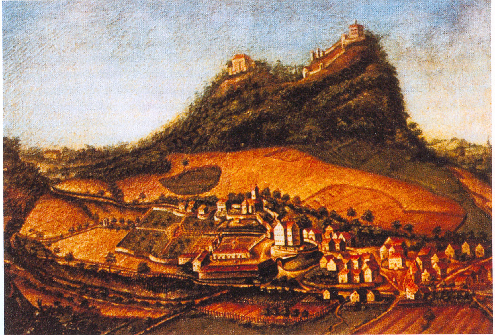 Weiterdingen mit dem Schloss der Freiherren von Hornstein im Hintergrund der Hohenstoffeln Ölbild